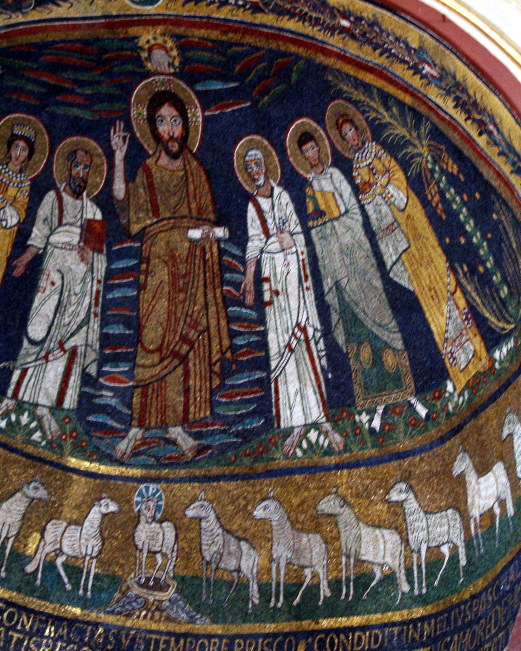 Mosaique dans l'église Santa Ceciclia Travesere à Rome